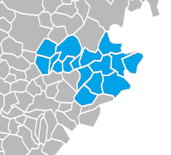 Petite Gavacherie, enclave linguistique du poitevin-saintongeais, dans sa partie du département de la Gironde. Légende Bleu : Petite Gavacherie. Sources Bénédicte et Jean-Jacques Fénié, "Dictionnaire des pays et provinces de France", Bordeaux, Éditions Sud-Ouest, 2000, 349 p.